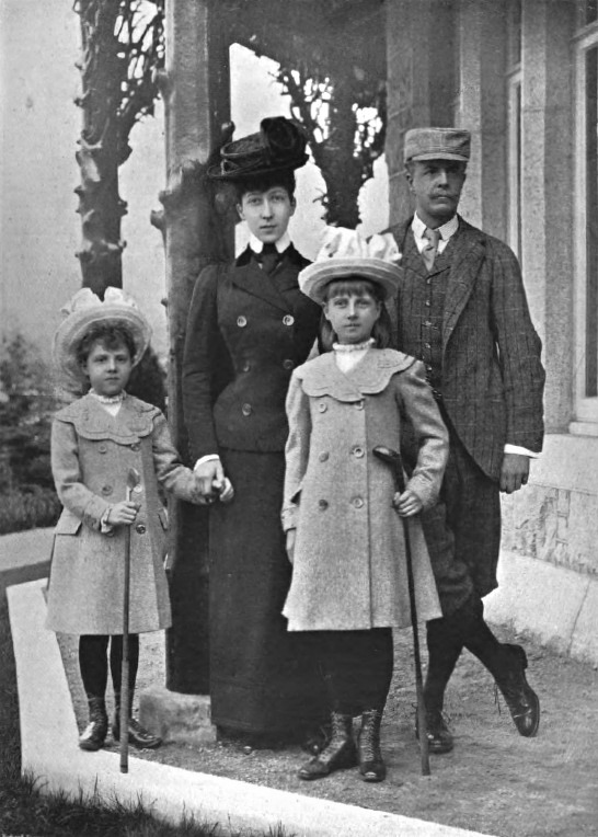 Foto des Herzogs und der Herzogin von Fife mit ihren beiden Töchtern